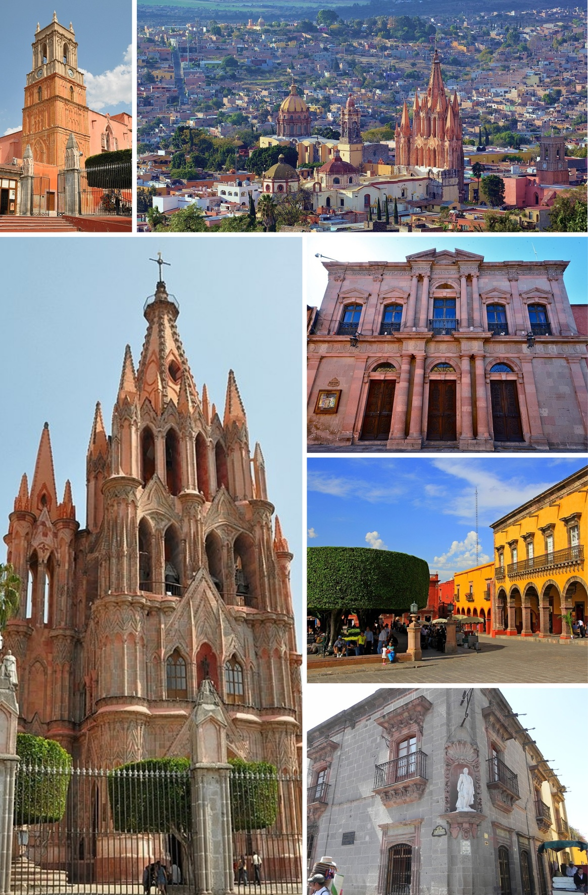 San Miguel de Allende